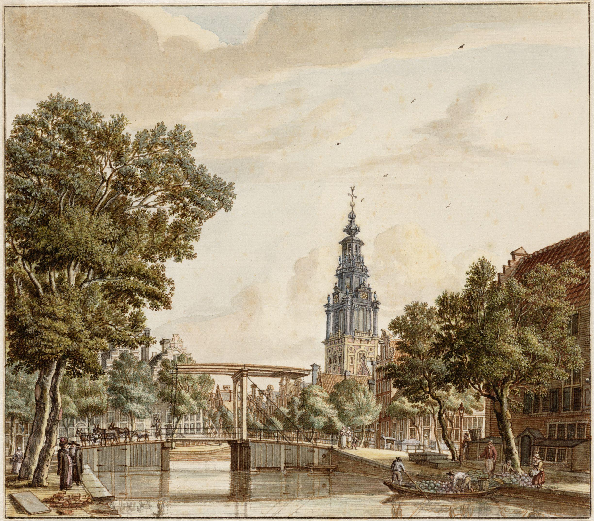 Beschrijving Zwanenburgwal gezien vanaf de Houtgracht, tegenwoordig het Waterlooplein, naar de Raamgracht en de Zuiderkerk Rechts Waterlooplein 1. Rechts op de Houtgracht de Joden-groentemarkt met een groenteschuit. Documenttype tekening Vervaardiger Beijer, Jan de (1703-1780) Collectie Collectie Atlas Splitgerber Datering 1757 Geografische naam Houtgracht Waterlooplein Zwanenburgwal Inventarissen Afbeeldingsbestand 010001000438